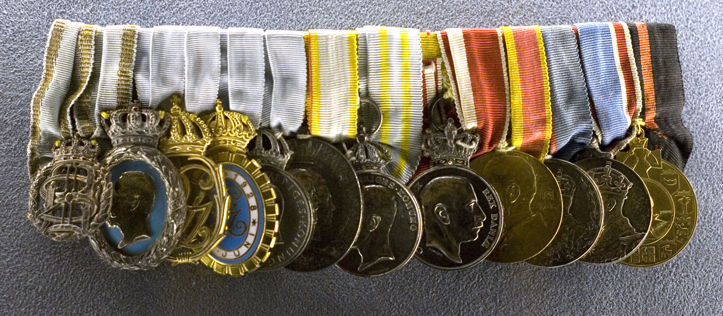 Gustaf VI Adolfs medaljer och minnestecken burna i band på bröstet.